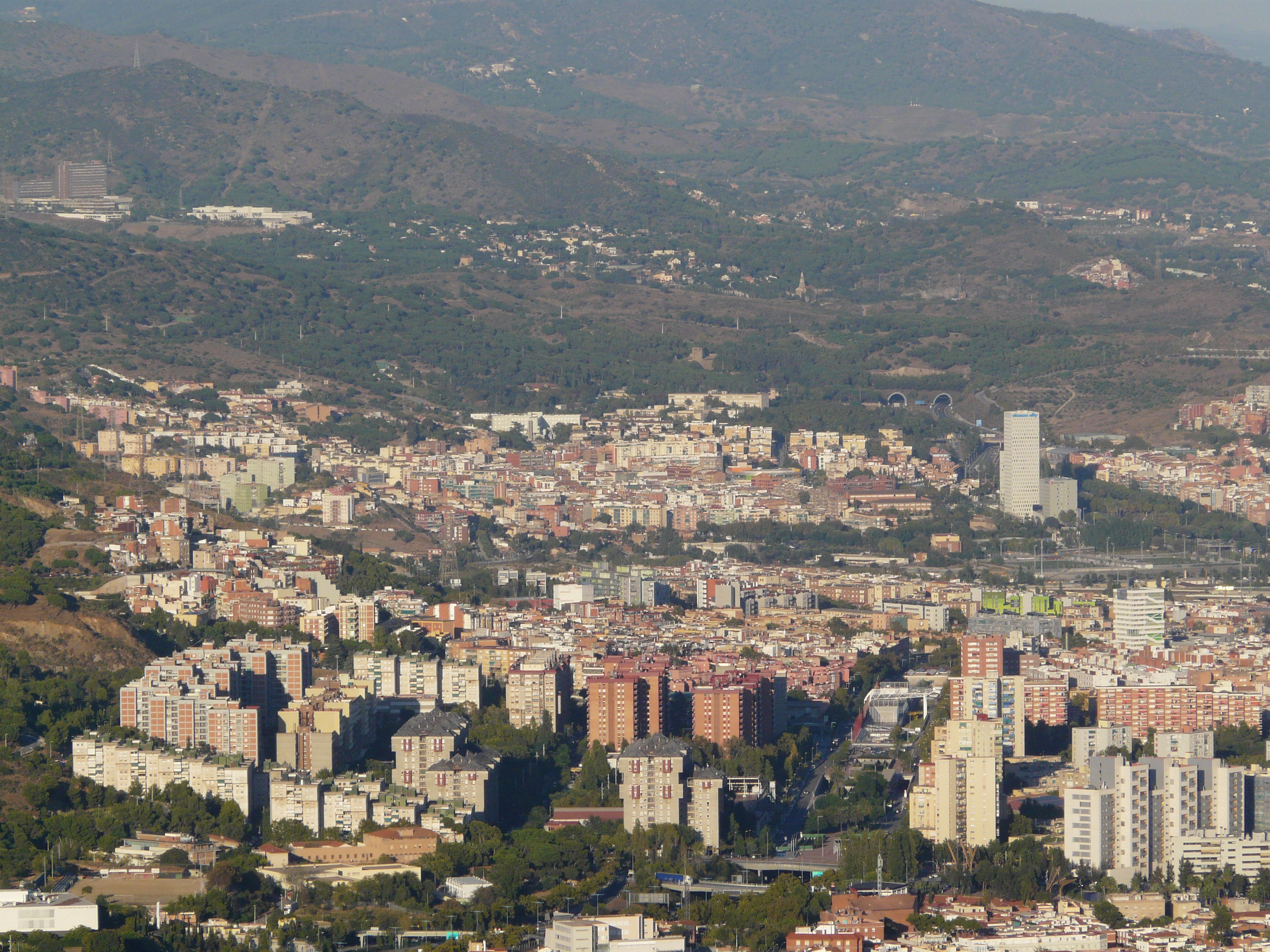 La Conreria-Sant Mateu-Céllecs (Maresme, Vallès Oriental, Barcelonès) (Argentona, la Roca del Vallès, Vilassar de Dalt i altres). This is a a photo of a natural area in Catalonia, Spain, with id: ES510244 Object location41° 31′ 48″ N, 2° 19′ 48″ E